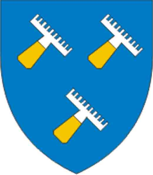 Wapen von Curtilles Kanton Waadt